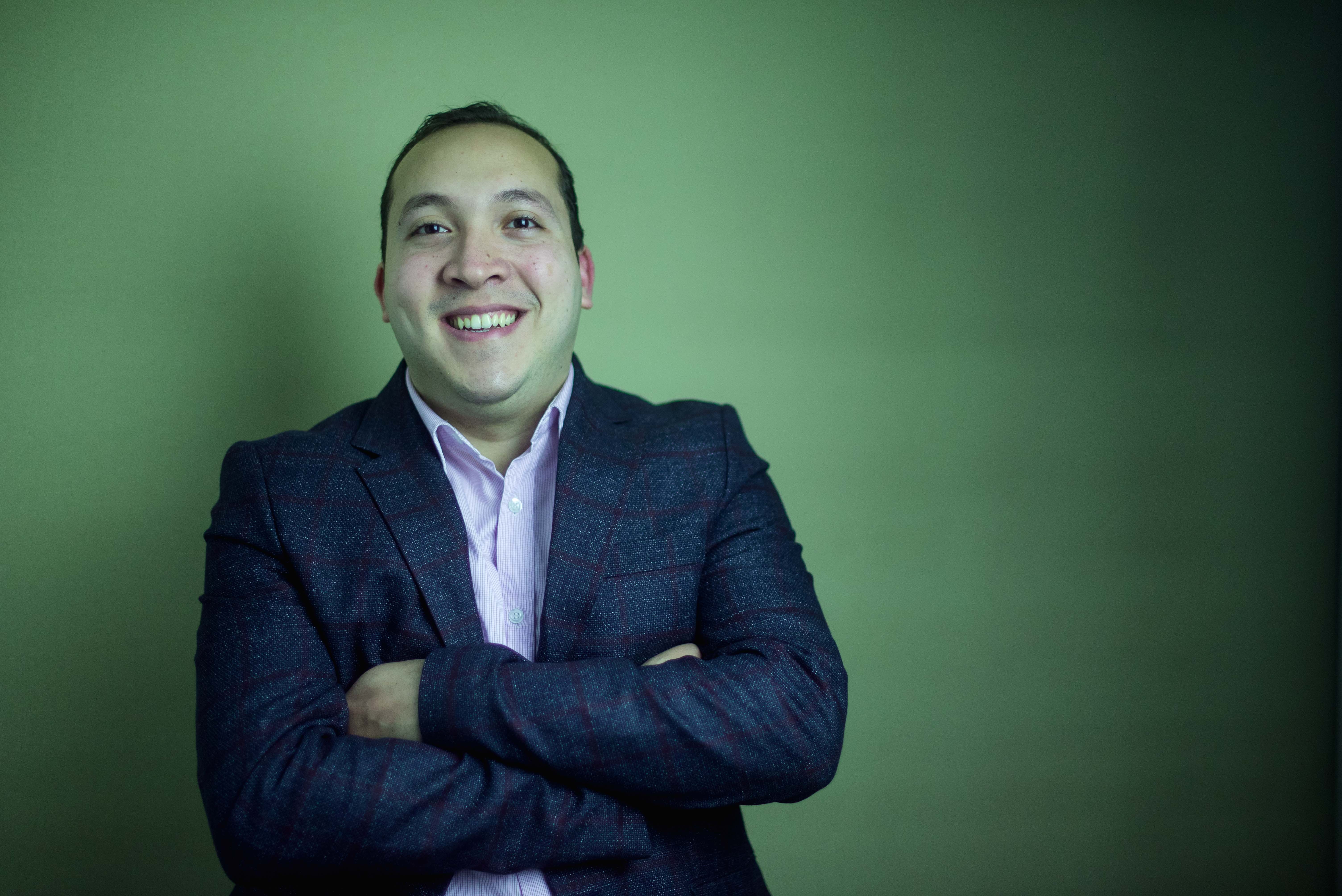 الكاتب الصحفي والمستشار الإعلامي راجي عامر خلال أحد الفعاليات